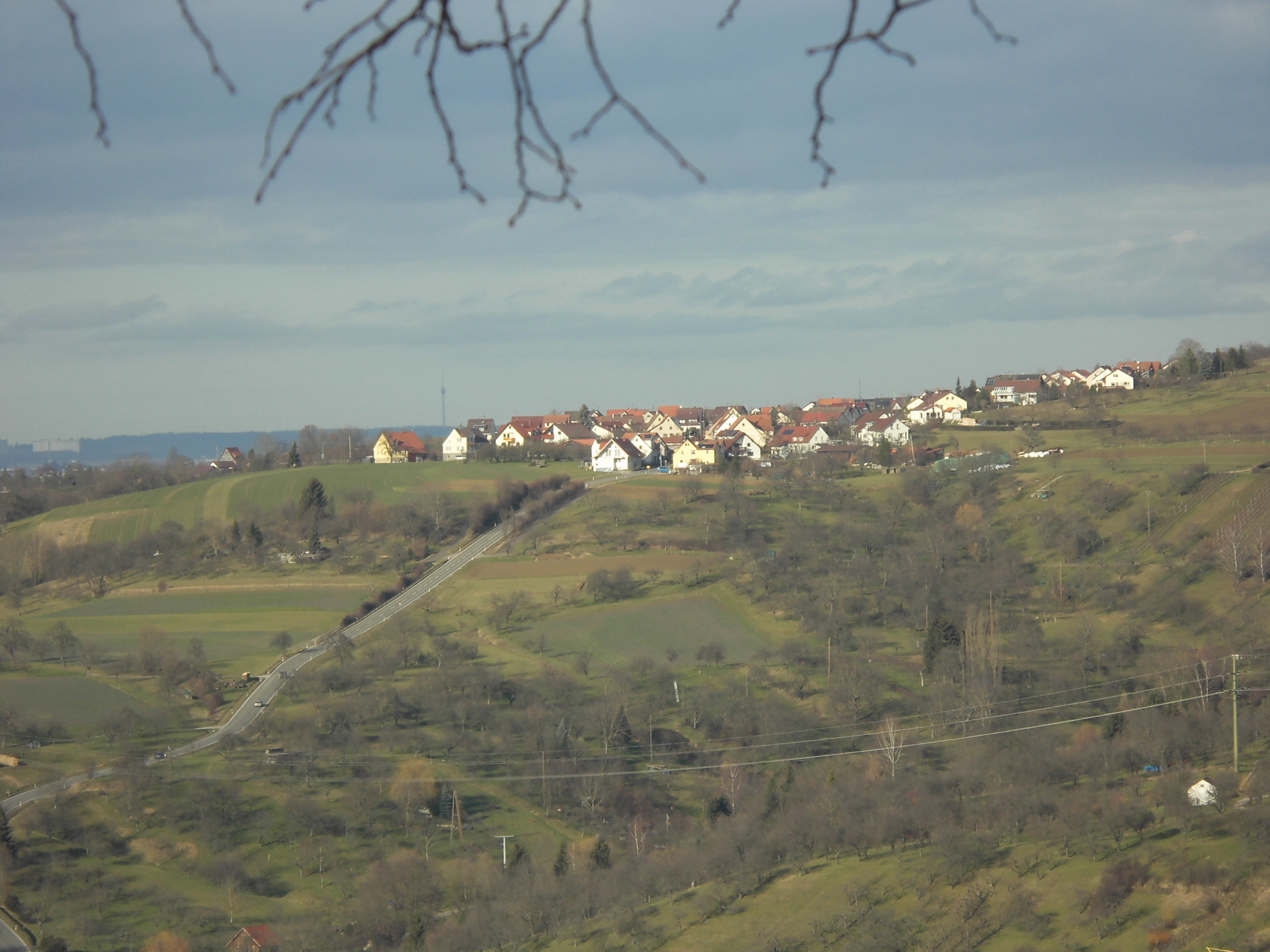 Kappishäusern mit der Kreisstraße K 6712 nach Dettingen an der Erms